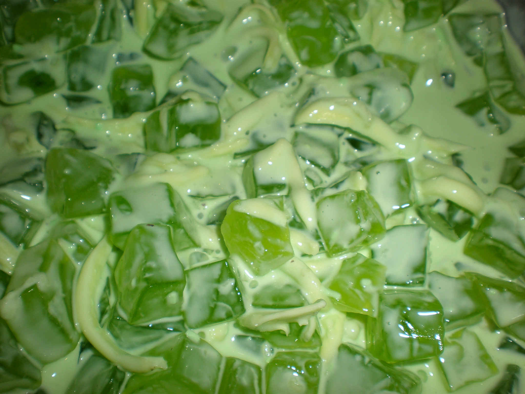 Buko pandan